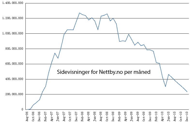 Sidevisninger Nettby fra lansering til nettsamfunnet ble stengt.